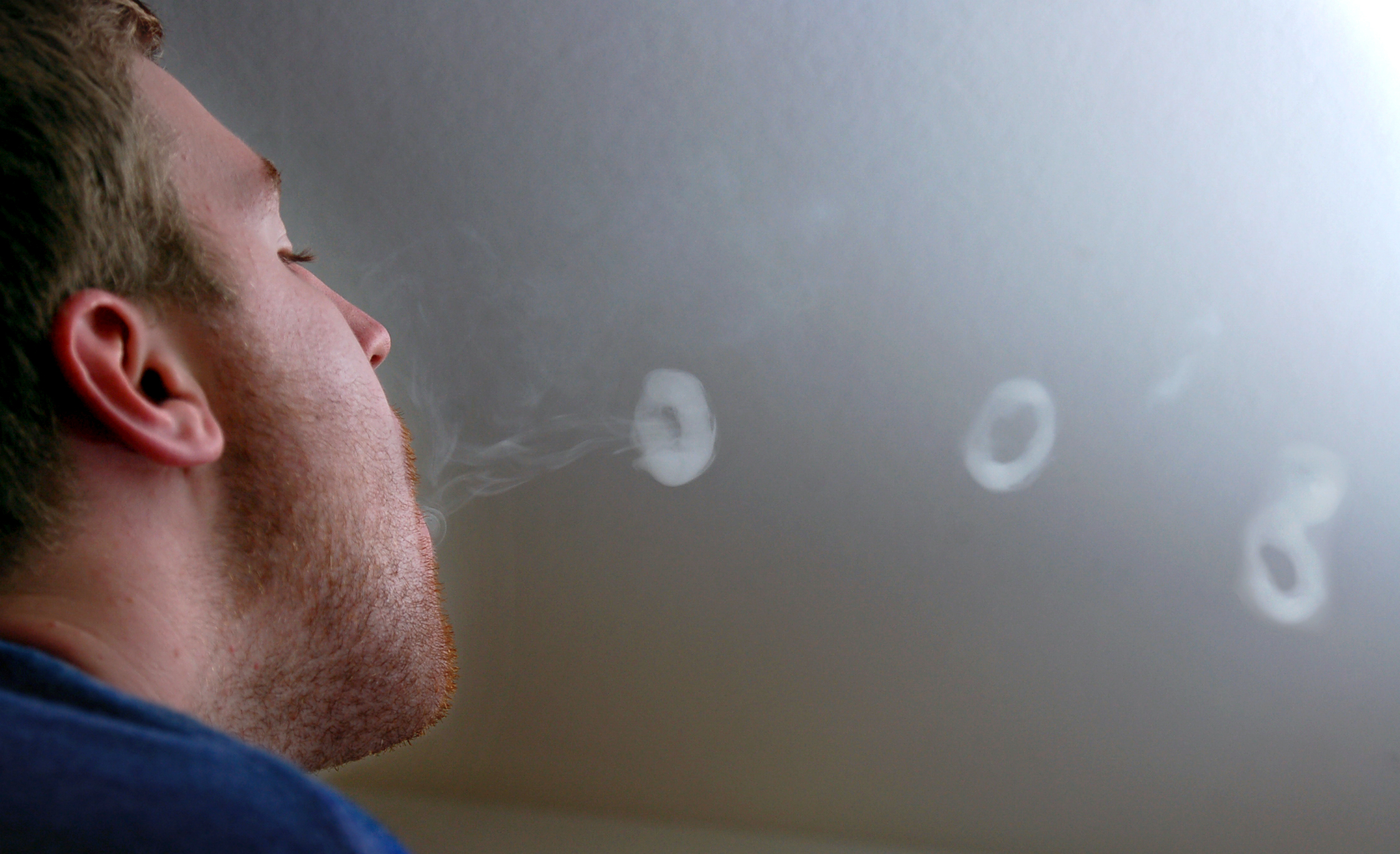 Human smoke rings